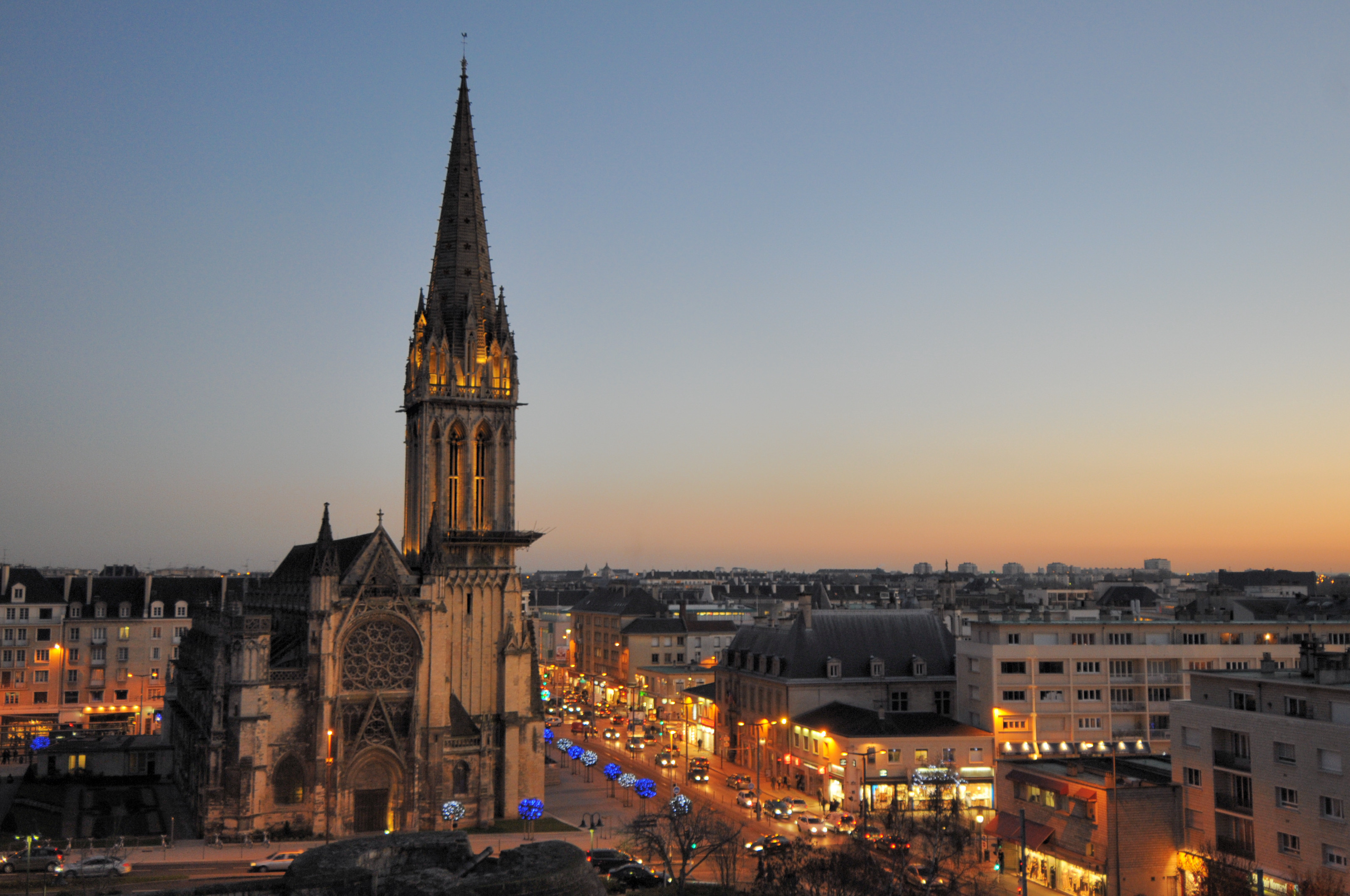 vue depuis le château sur l'église Saint-Pierre et le centre-ville de Caen dans le Calvados (Basse-Normandie, France).